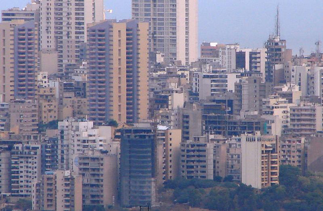 i palazzi di Achrafieh